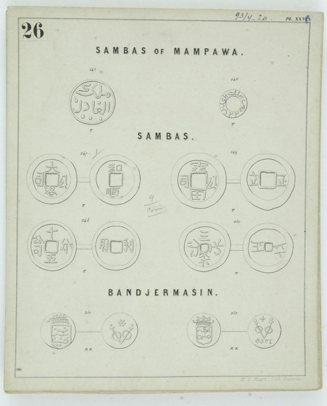 Prent. Munten uit Sambas of Mampawa, Sambas en Bandjersamin.